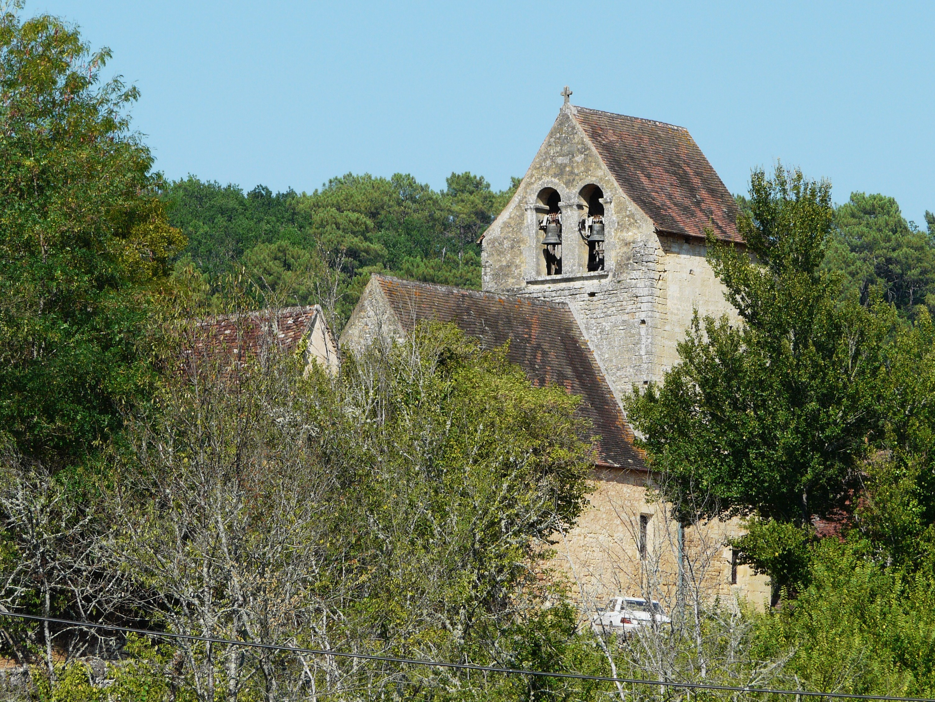 L'église Saint-Denys de Savignac-de-Miremont, Dordogne, France.